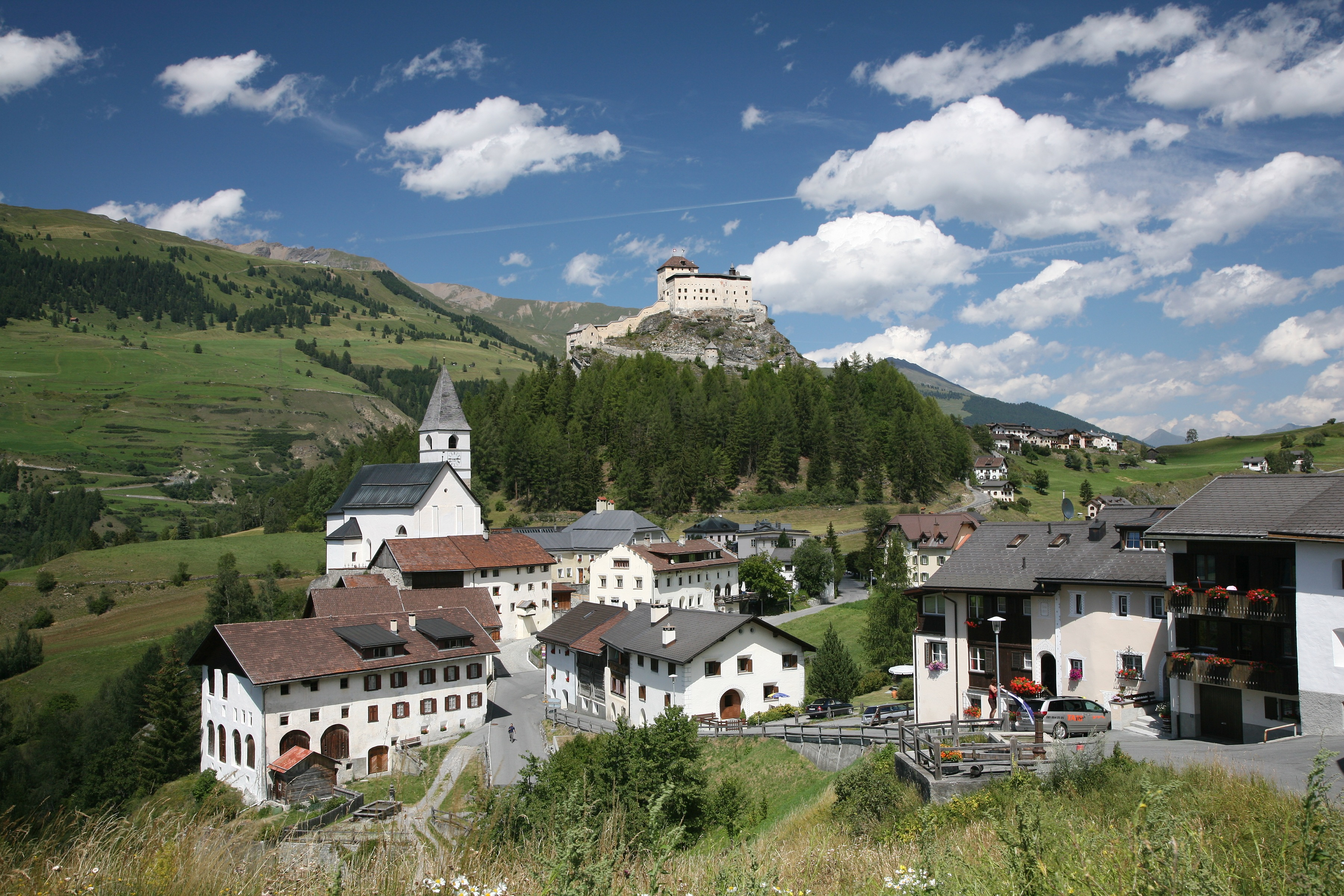 Tarasp Fontana im Unterengadin